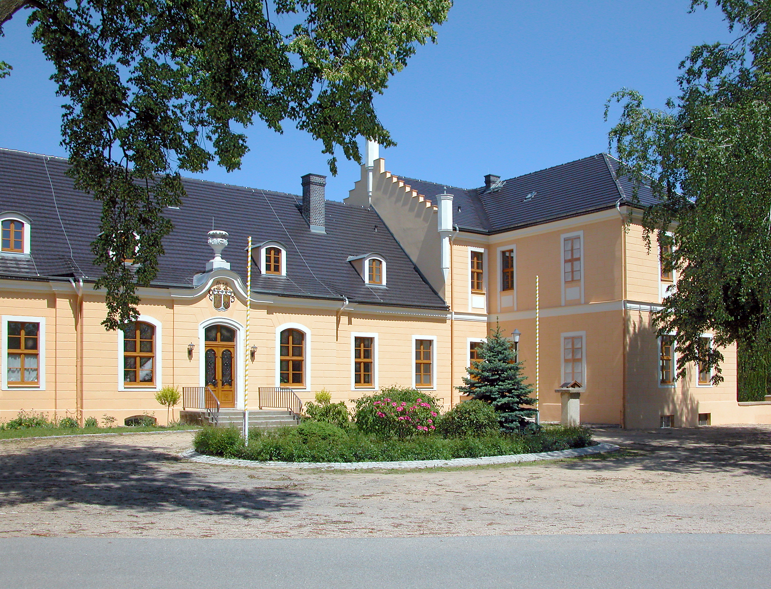 19.05.2007 02829 Kunnersdorf (Gemeinde Schöpstal), Liebsteiner Straße 4 (GMP: 51.199600,14.924341): Neues Schloß. Die Erbauungszeit wird nach 1740 vermutet. Nach dem II. Weltkrieg und in der DDR diente das Schloß als Flüchtlingsunterkunft, Schule und seit 1984 als Gemeindeverwaltung. 2003 bis 2006 von der Gemeinde Schöpstal saniert. Heute Sitz einer Firma. [DSCN28048.TIF]20070519020DR.JPG(c)Blobelt